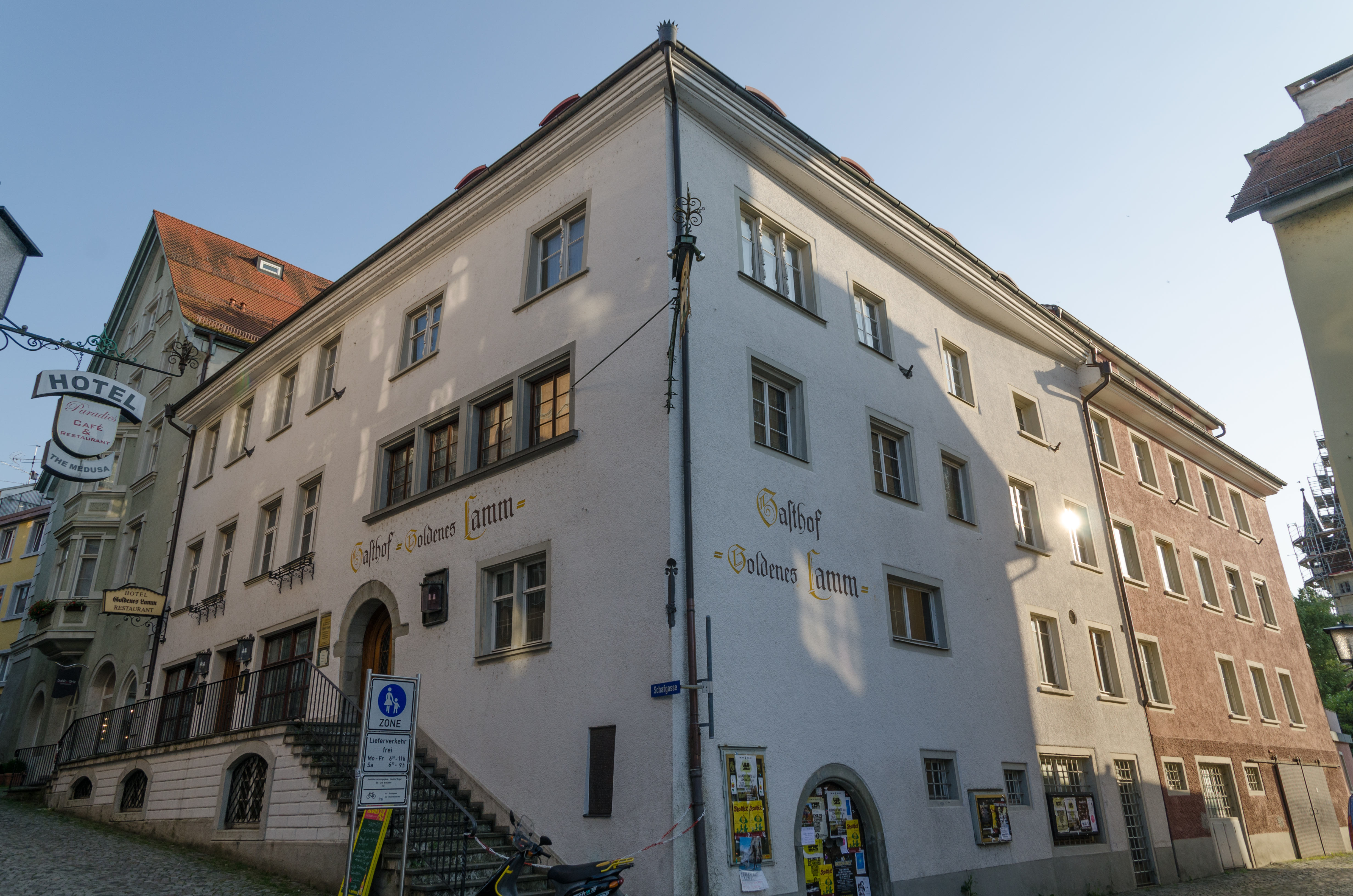 Lindau, Schafgasse 3